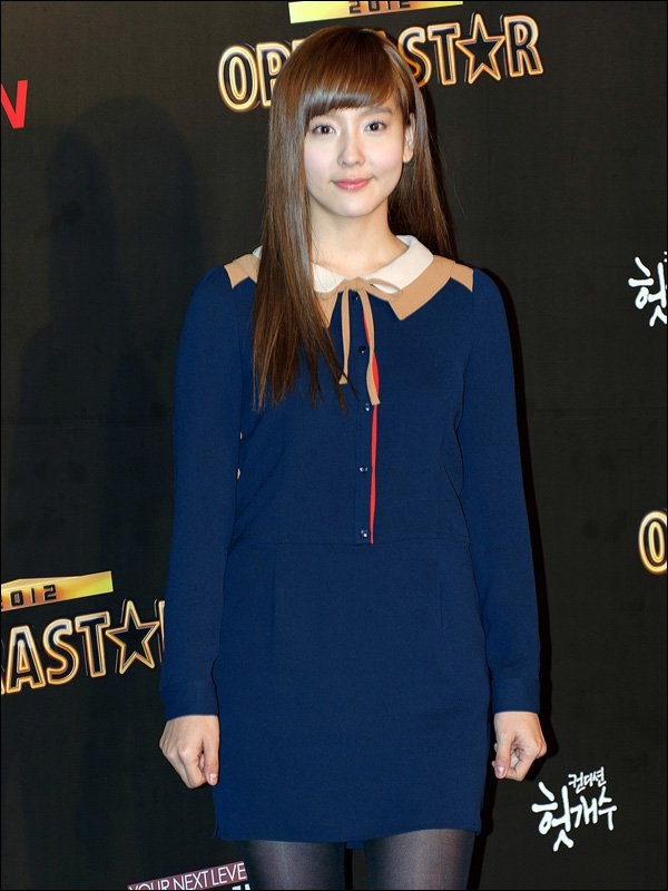 tvN 오페라스타 2012 제작 발표회에 참여한 천상지희의 멤버 다나